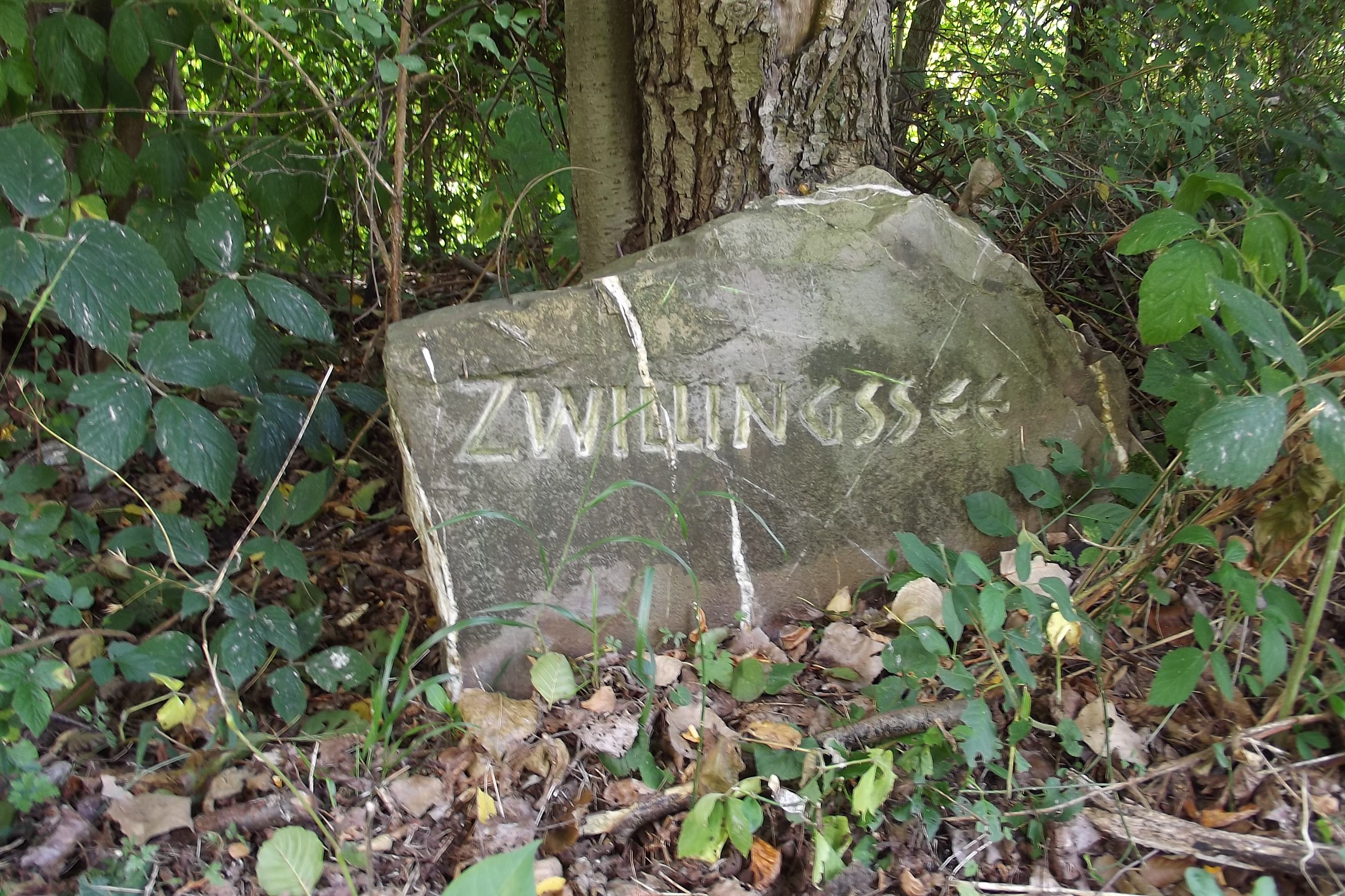 Der Namensstein am Zwillingssee, Stadtgebiet Brühl (Rheinland)